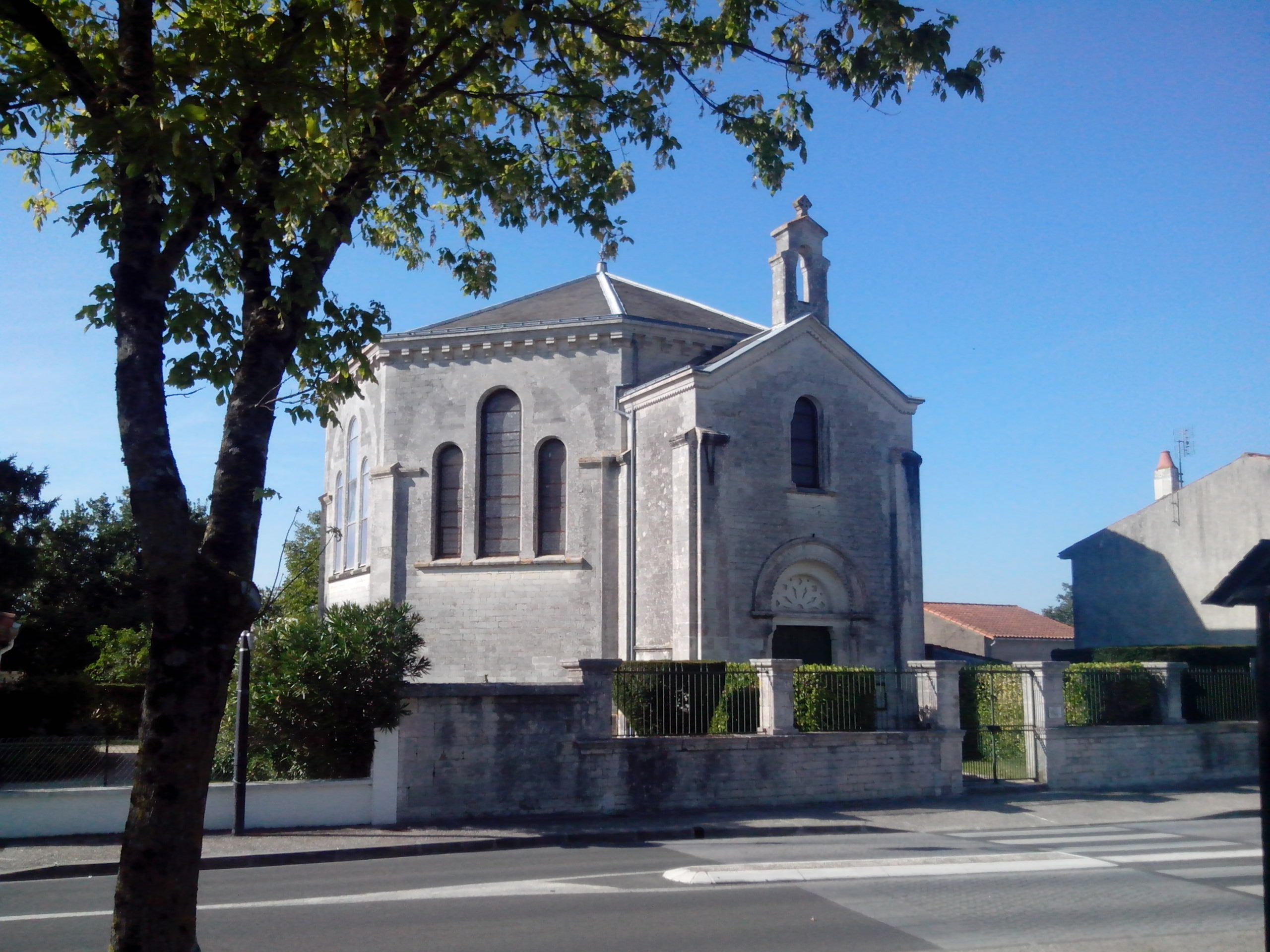 Temple protestant de Saint-Sulpice-de-Royan